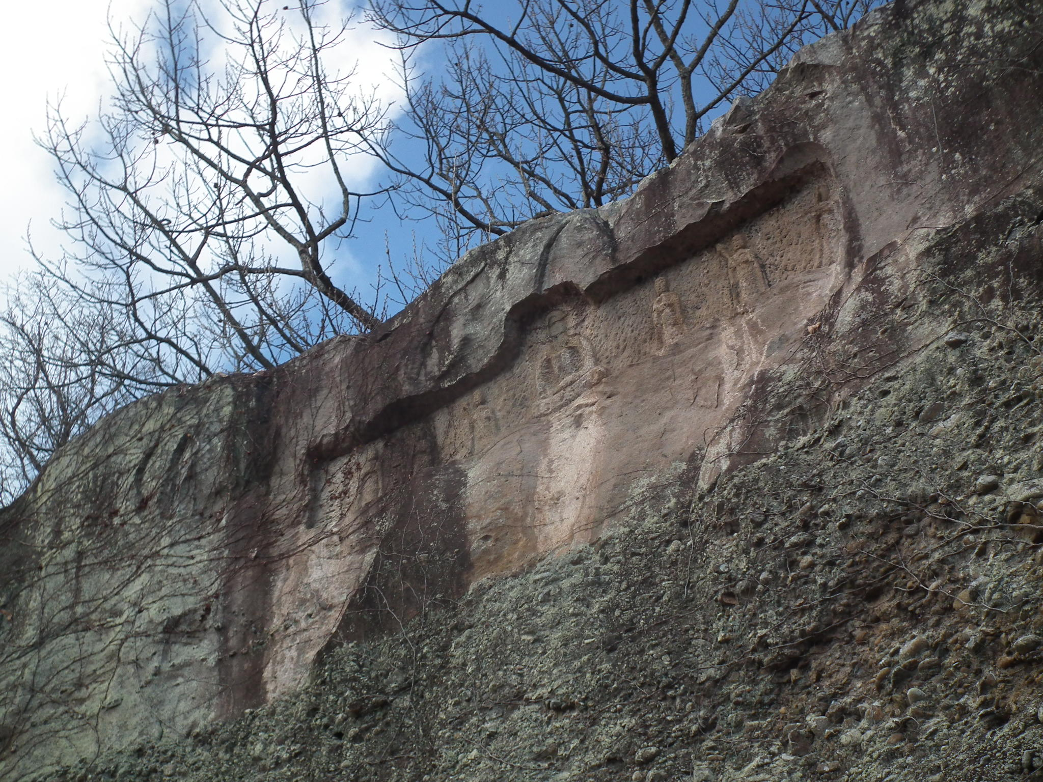 Kidu-Magaibutsu 木津磨崖仏 神戸市西区押部谷町木津